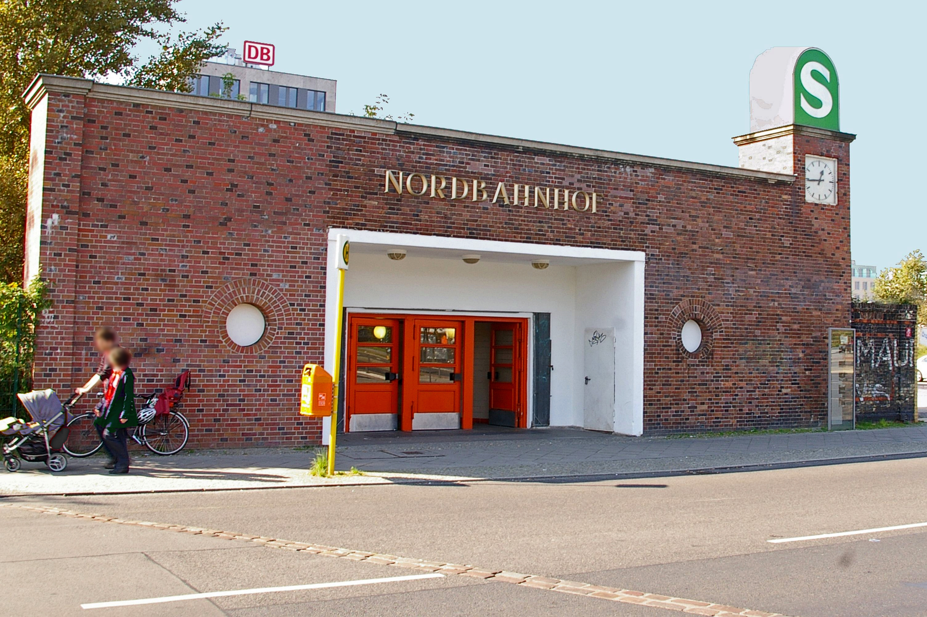 Nordbahnhof in Berlin, Nördlicher Zugang